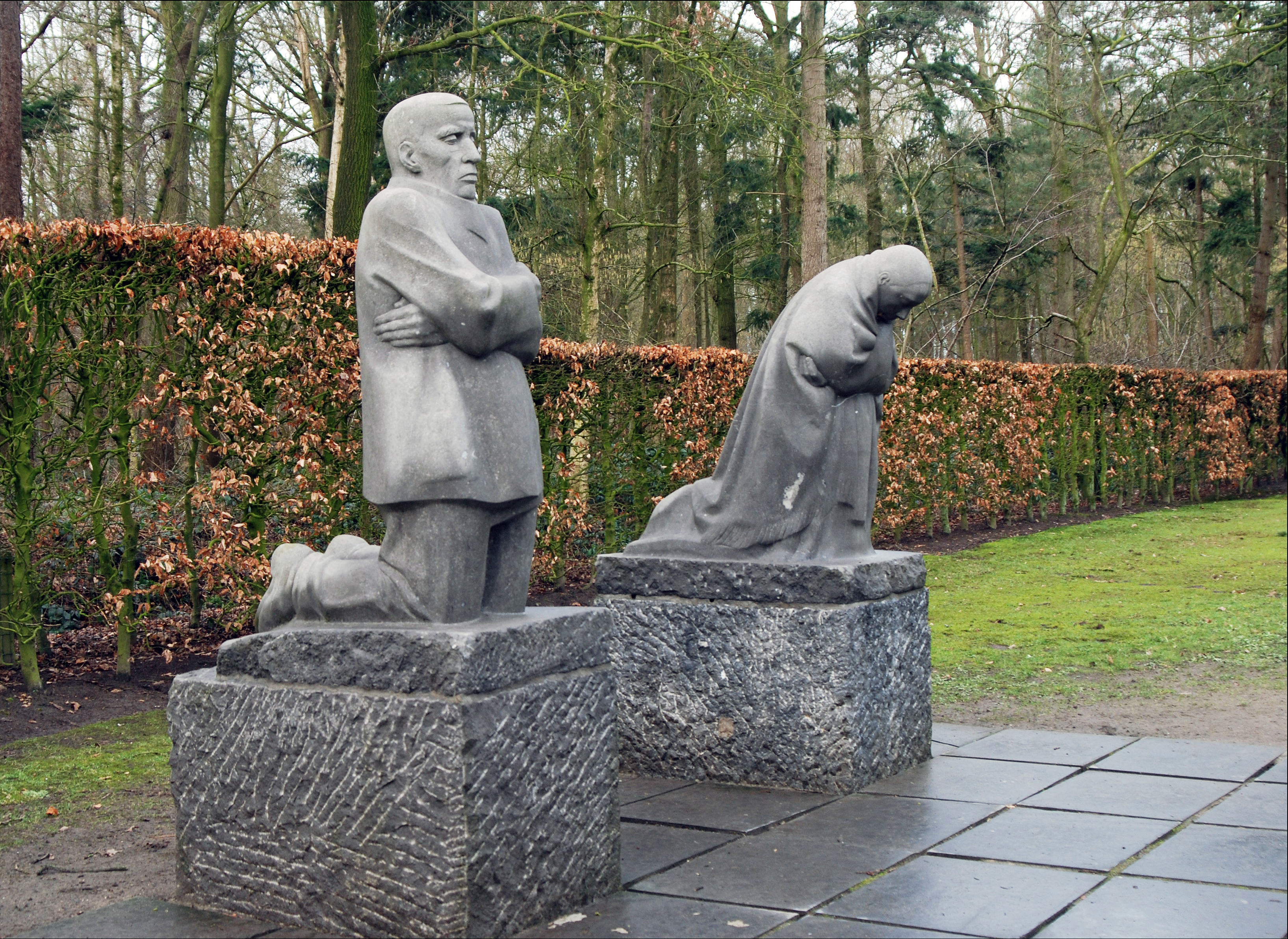 Deutscher Soldatenfriedhof Vladslo : Trauernde Eltern (Käthe Kollwitz)